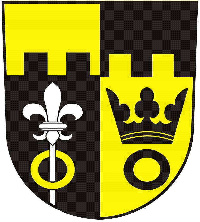 Znak obce Staré Místo